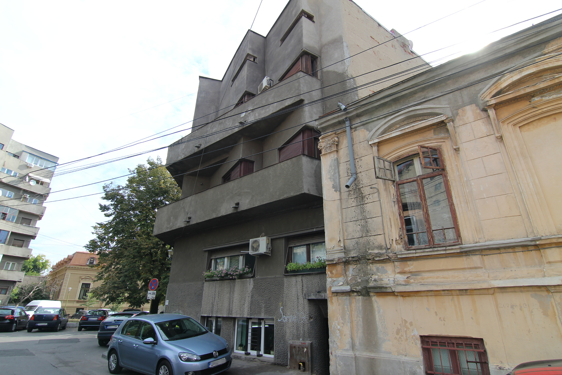 Imobil locuințe pe Stelea Spătarul